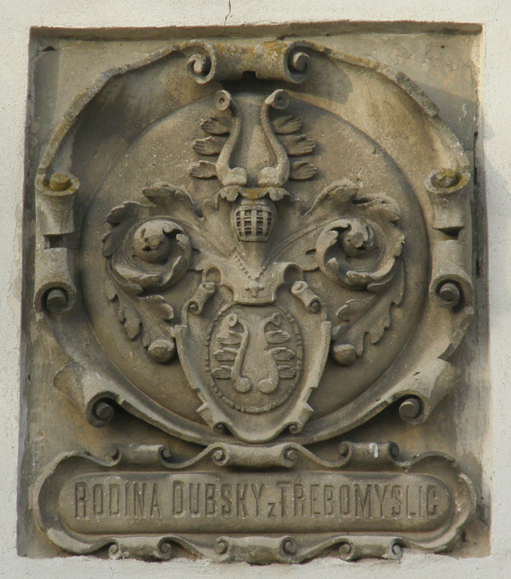 Pohřební kaple (Lysice), u hřbitova, Lysice - erb nad vchodem